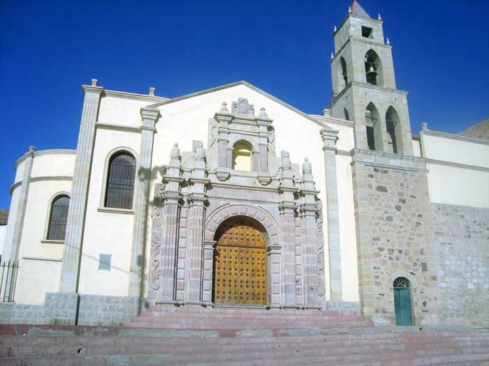 Fotografia del santuario del socavon en la ciudad de Oruro Bolivia, el santuario empezo como una ermita en el cerro pie de Gallo por los años de 1550 entre 1600 de la epoca colonial